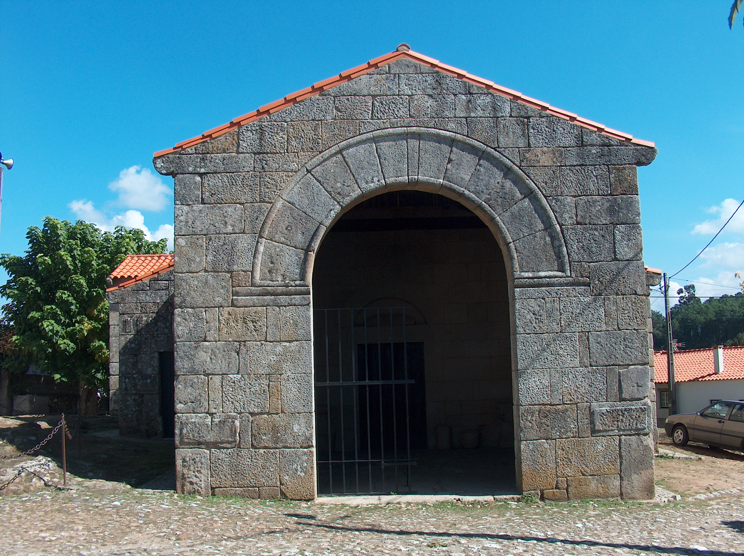 Igreja de São Pedro de Lourosa ou Igreja Matriz de Lourosa This file was uploaded for Wiki Loves Monuments in Portugal with the unique identifier 70268.